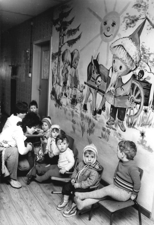 Motzlar, Blick in den Kindergarten ADN-ZB Schaar 24.3.86 Bez. Suhl: Gemeinde Motzlar-Ein Bild des allerorts bekannten Sandmännchens schmückt den renovierten Kindergarten in der Gemeinde Motzlar. Rund 200 Bürger des nur 370 Einwohner zählenden Rhöndorfes schufen 1985 im "Mach-mit-Wettbewerb2 Werte über 255000 Mark. Zwei Eigenheime wurden fertiggestellt, drei Wohnungen modernisiert, Fassaden gestaltet. Des weiteren wurden eine Schwesternstation geschaffen und der Kindergarten verschönert. Motzlar erhält eine Ehrenurkunde für hervorragende Leistungen in der Bürgerinitiative "Schöner unsere Städte und Gemeinden - Mach mit!" zu Ehren des XI. Parteitages der SED.